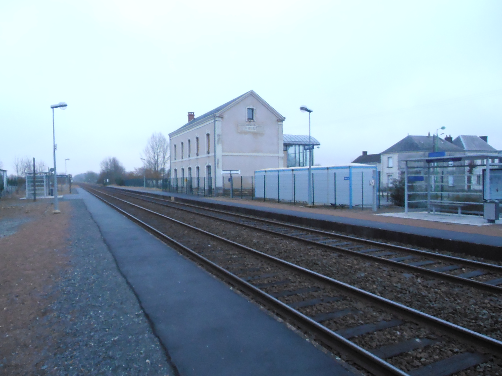 La gare vue des voies